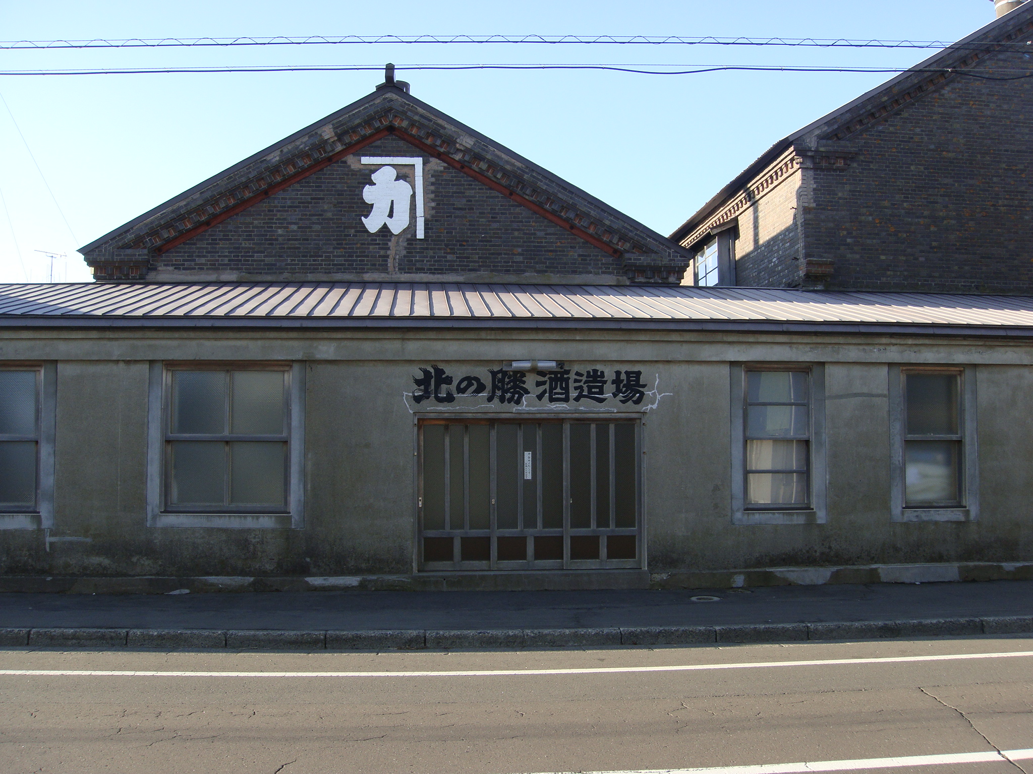 碓氷勝三郎商店 北の勝酒造場